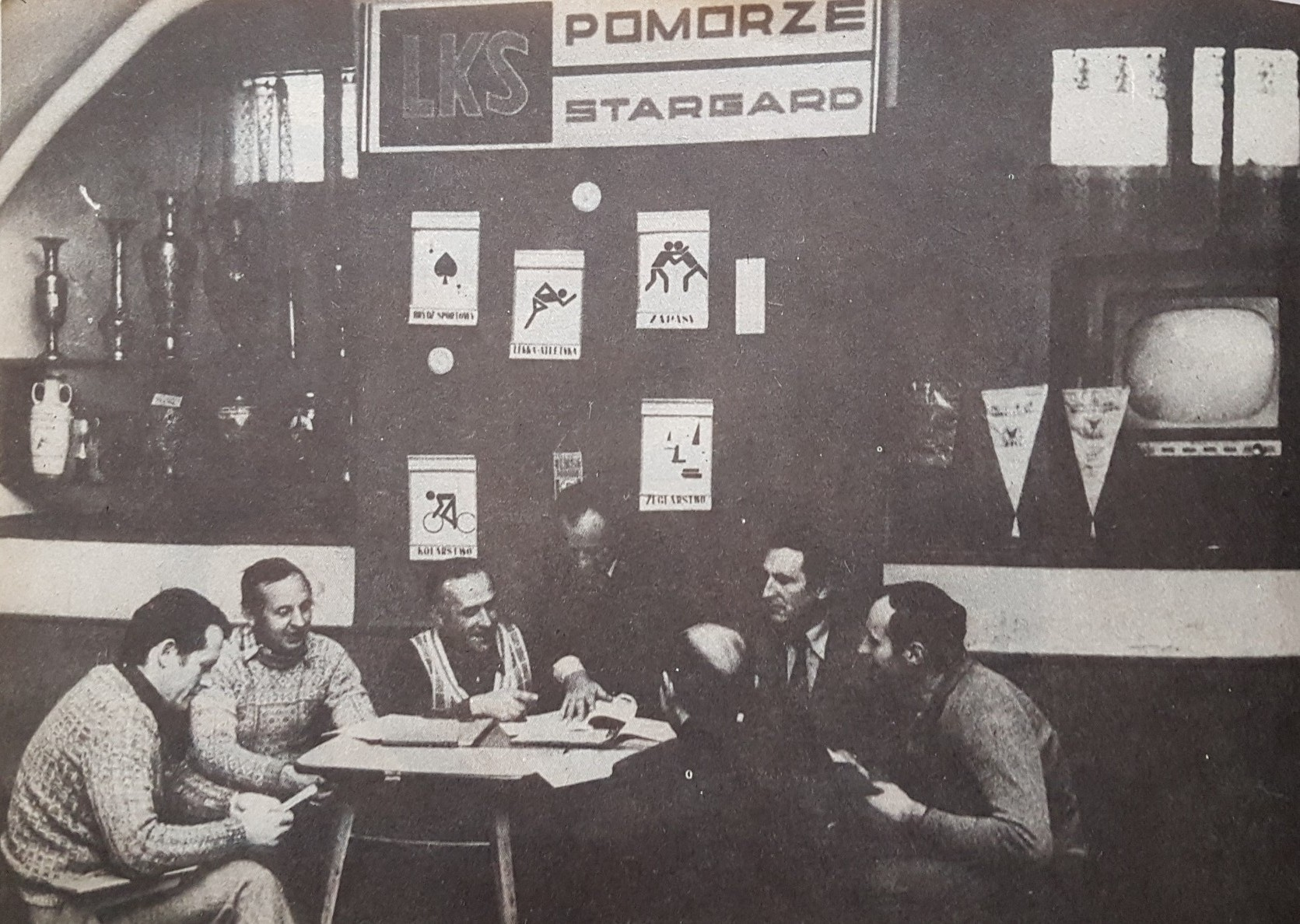 Działacze i trenerzy LKS Pomorza Stargard